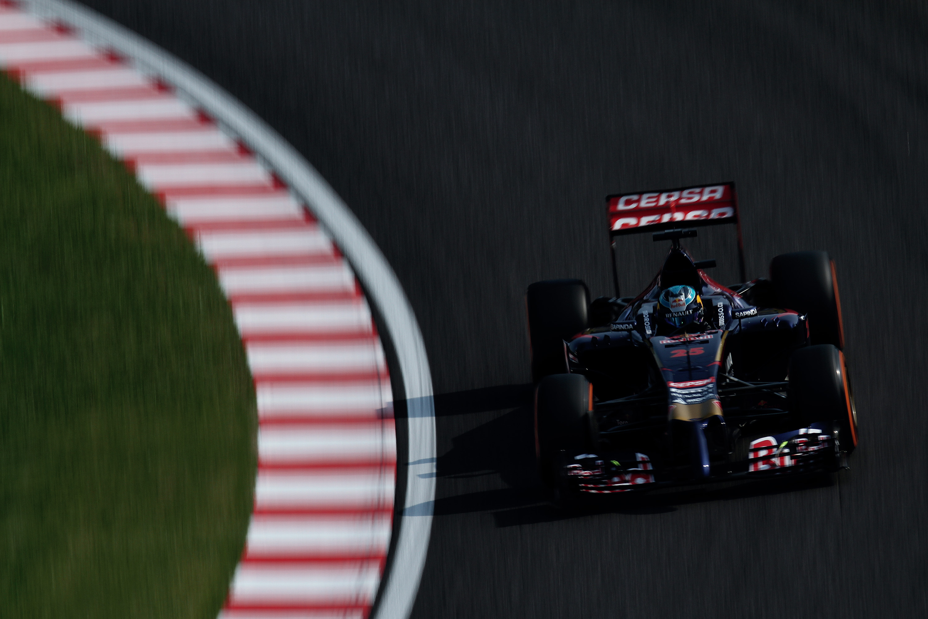 2014.10.3 F1 Rd.15 Suzuka FP2, Scuderia Toro Rosso (STR9) 25 ジャン・エリック・ベルニュ [IMG_8972ks]